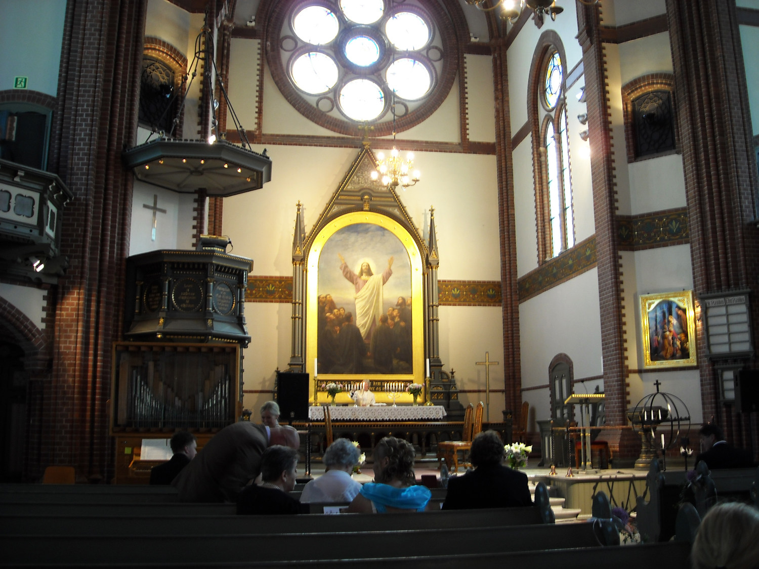 Innsiden av Arendal Trefoldighetskirke ved et bryllup